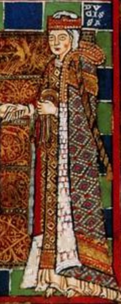 Evangeliář Jindřicha Lva ; Gospels of Henry the Lion, 1175-88, (Cod. Guelf. 105 Noviss. 2), Illumination on parchment, 340 x 255 mm, Herzog August Bibliothek, Wolfenbüttel